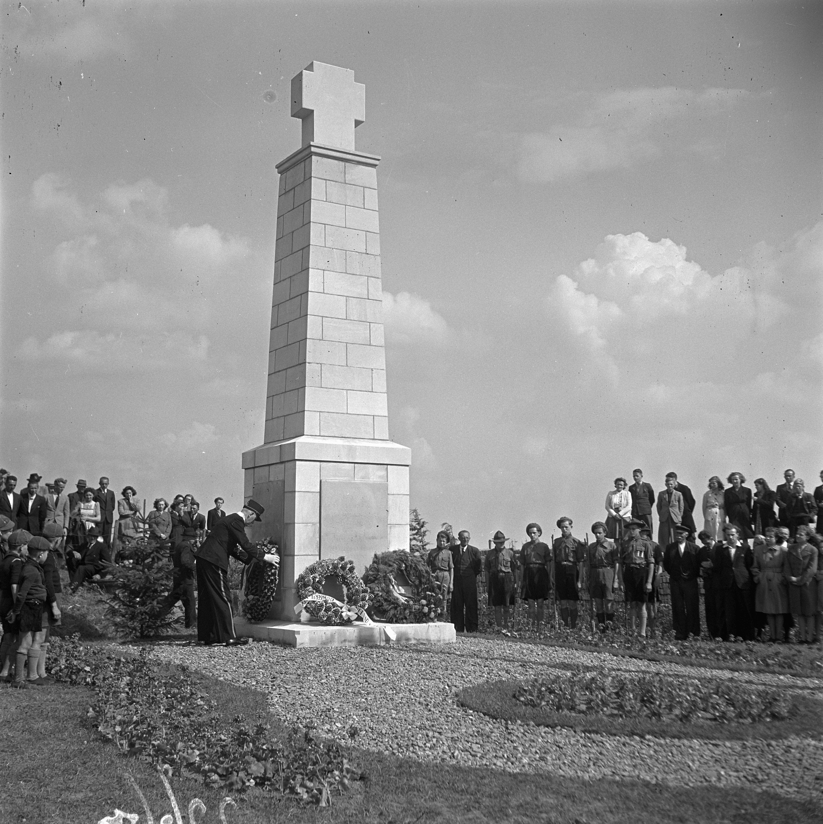 Collectie / Archief : Fotocollectie Anefo Reportage / Serie : [ onbekend ] Beschrijving : Onthulling monument gevallenen te Cuyk. Majoor Hueting legt krans Datum : 11 juli 1947 Locatie : Cuijk Trefwoorden : MONUMENT, Onthulling, gevallenen Persoonsnaam : KRANS Fotograaf : Wisman, Bram / Anefo Auteursrechthebbende : Nationaal Archief Materiaalsoort : Negatief (zwart/wit) Nummer archiefinventaris : bekijk toegang 2.24.01.03 Bestanddeelnummer : 902-2660